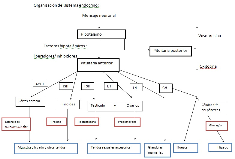 Esquema sobre la organización del sistema endocrino